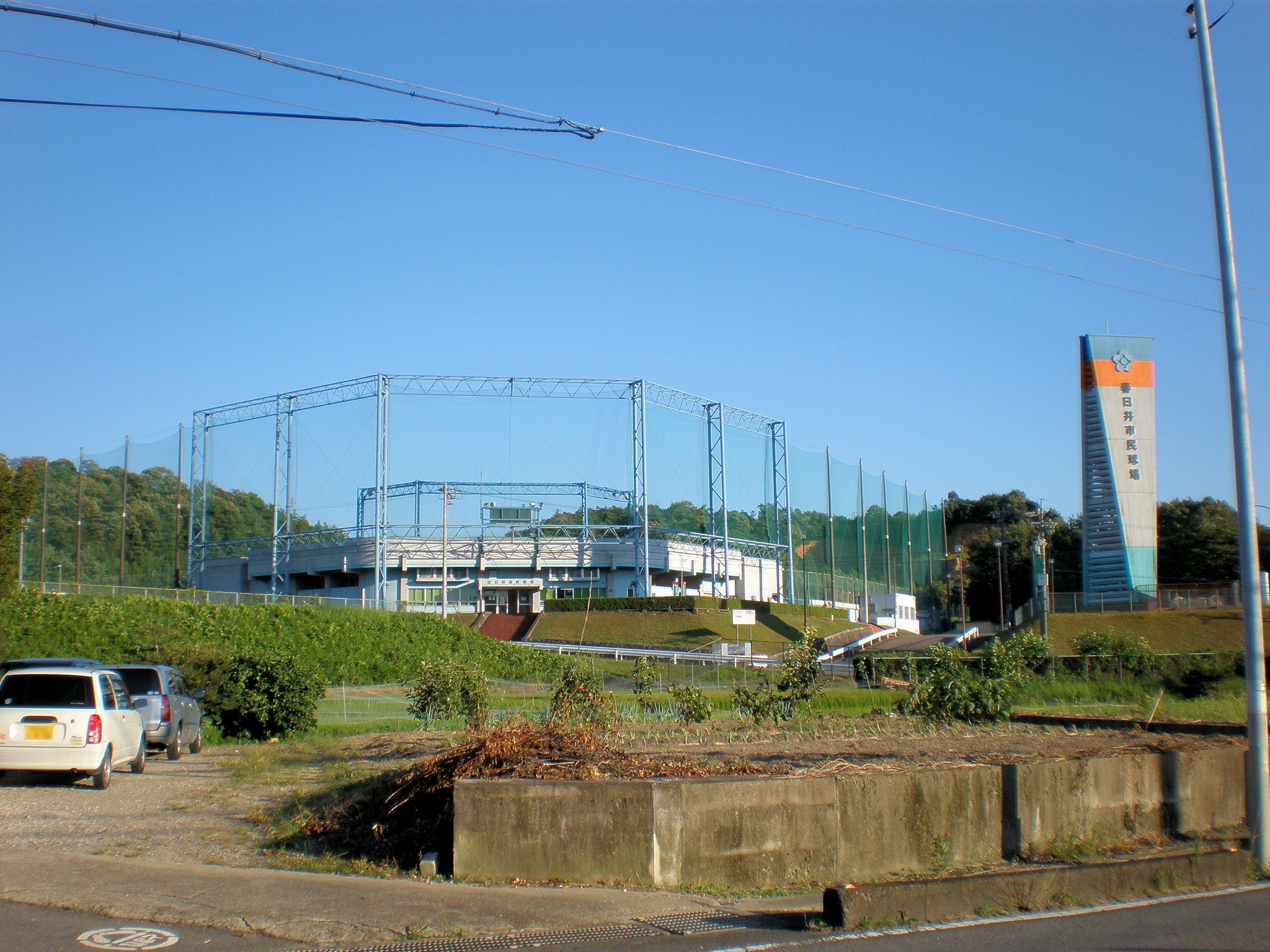 愛知県春日井市にある春日井市民球場